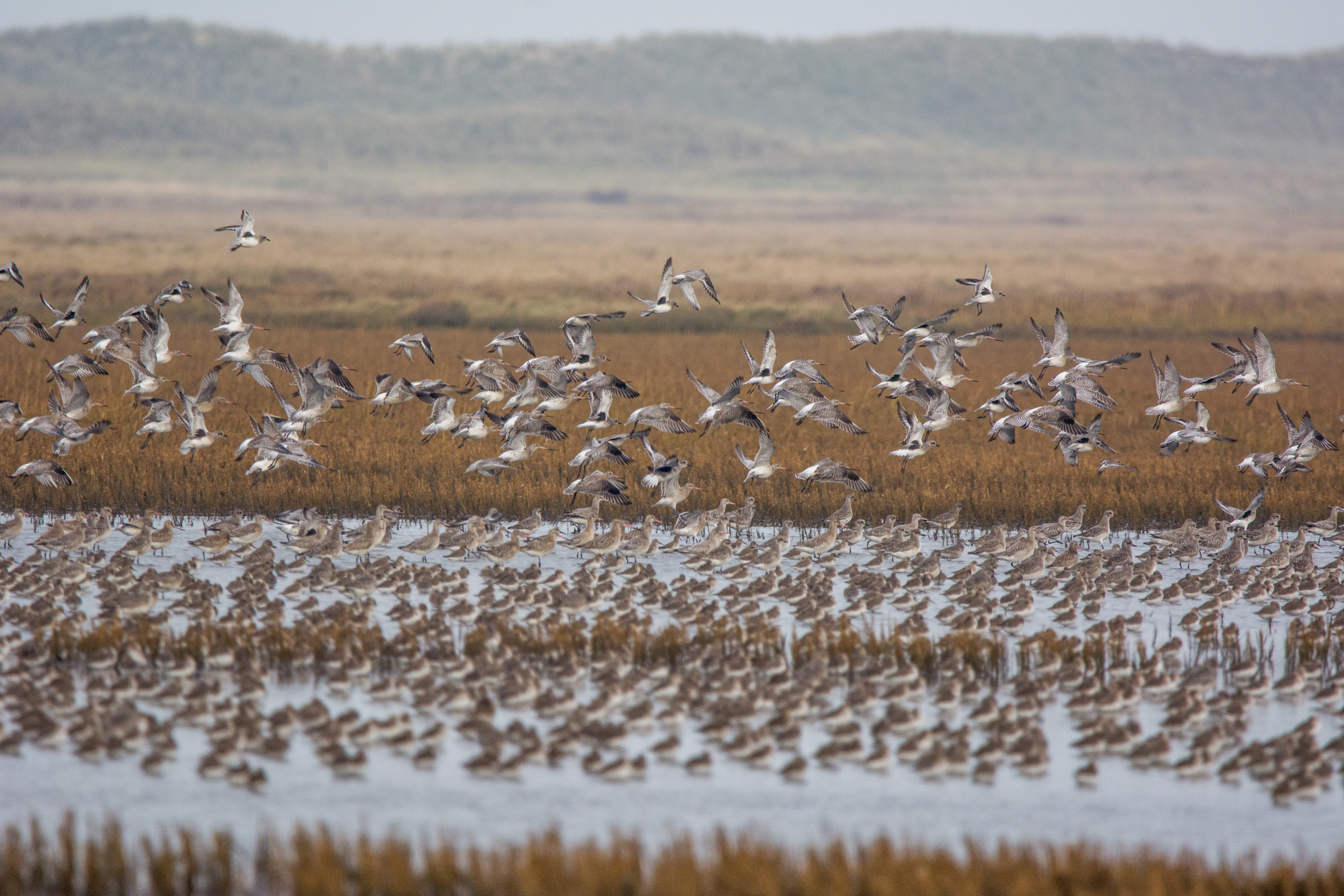 Rastende Limikolen auf Spiekeroog - Nationalpark niedersächsisches Wattenmeer (Kiebitzregenpfeifer, Pfuhlschnepfen, Alpenstrandläufer)